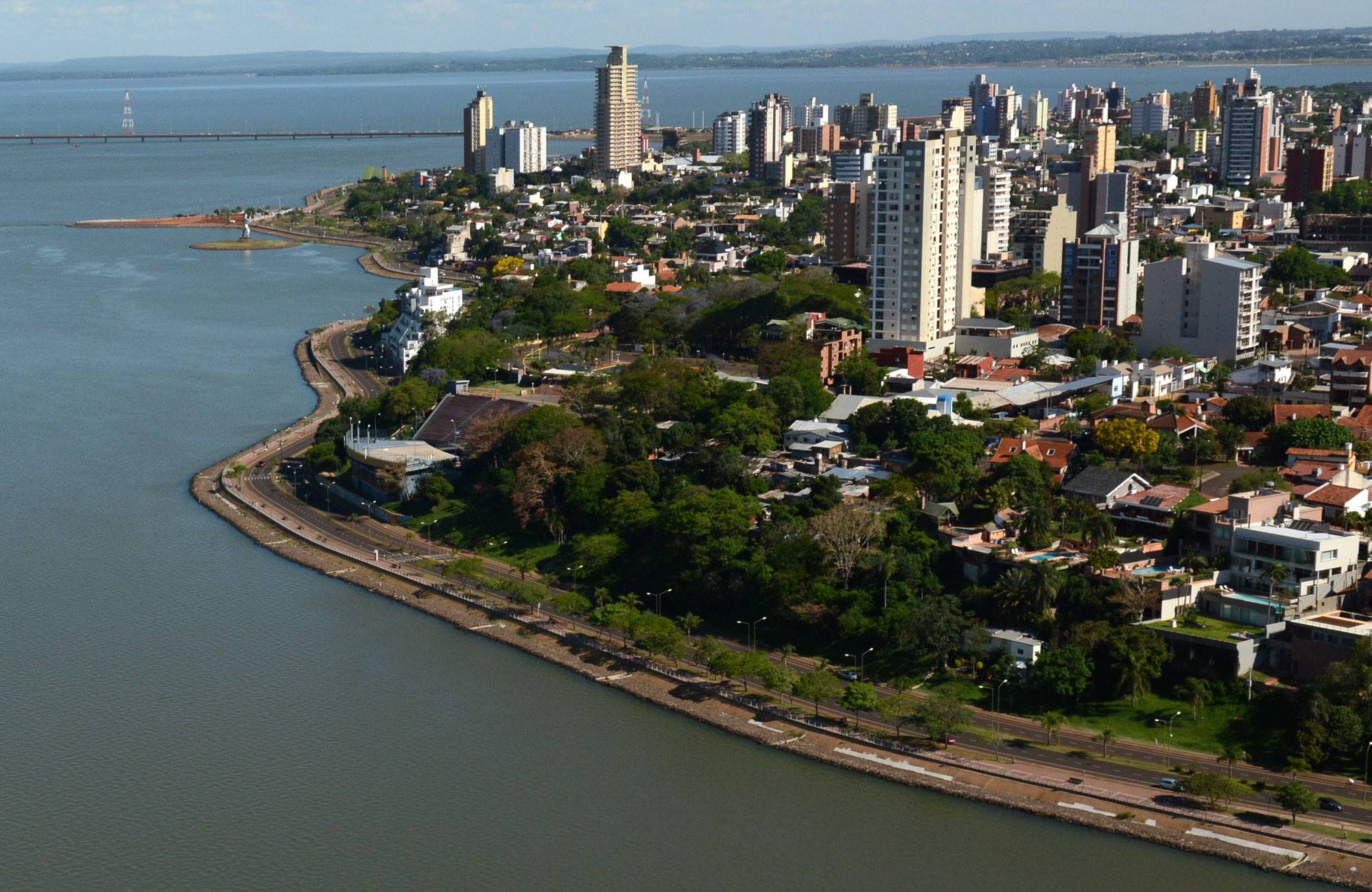 Toma aérea